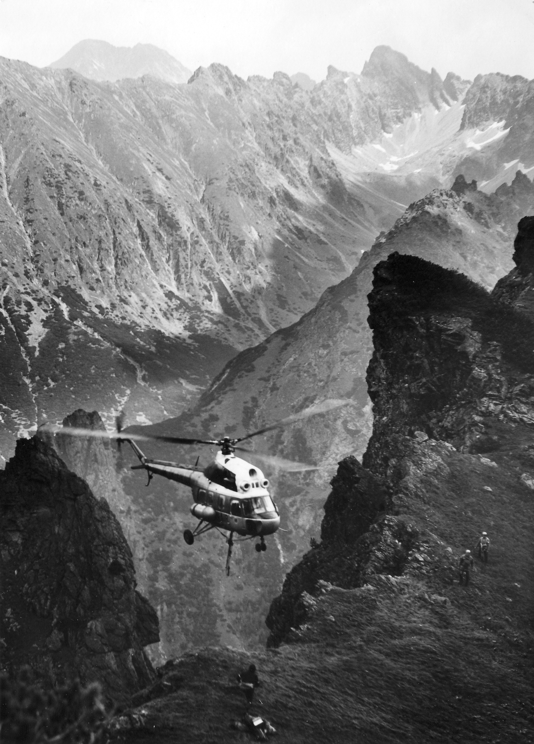 Záchranná akcia horskej služby vo Vysokých Tatrách v Bielovodskej doline v roku 1975